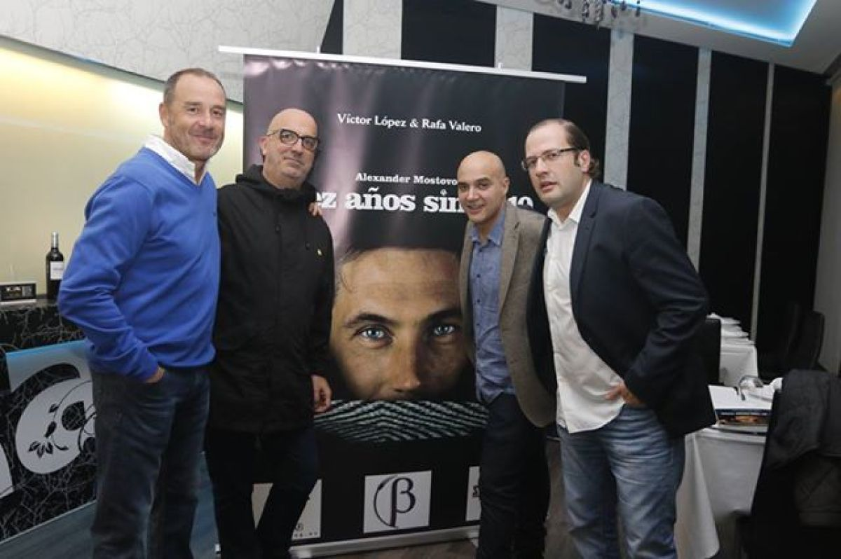 De esquerda a dereita, Víctor Fernández, Nicolás Pastoriza, Víctor López e Rafa Valero, na presentación do libro "Diez años sin el 10".